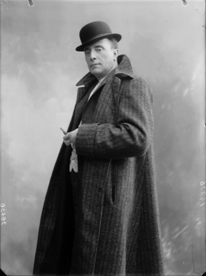 Italian actor Edoardo Ferravilla